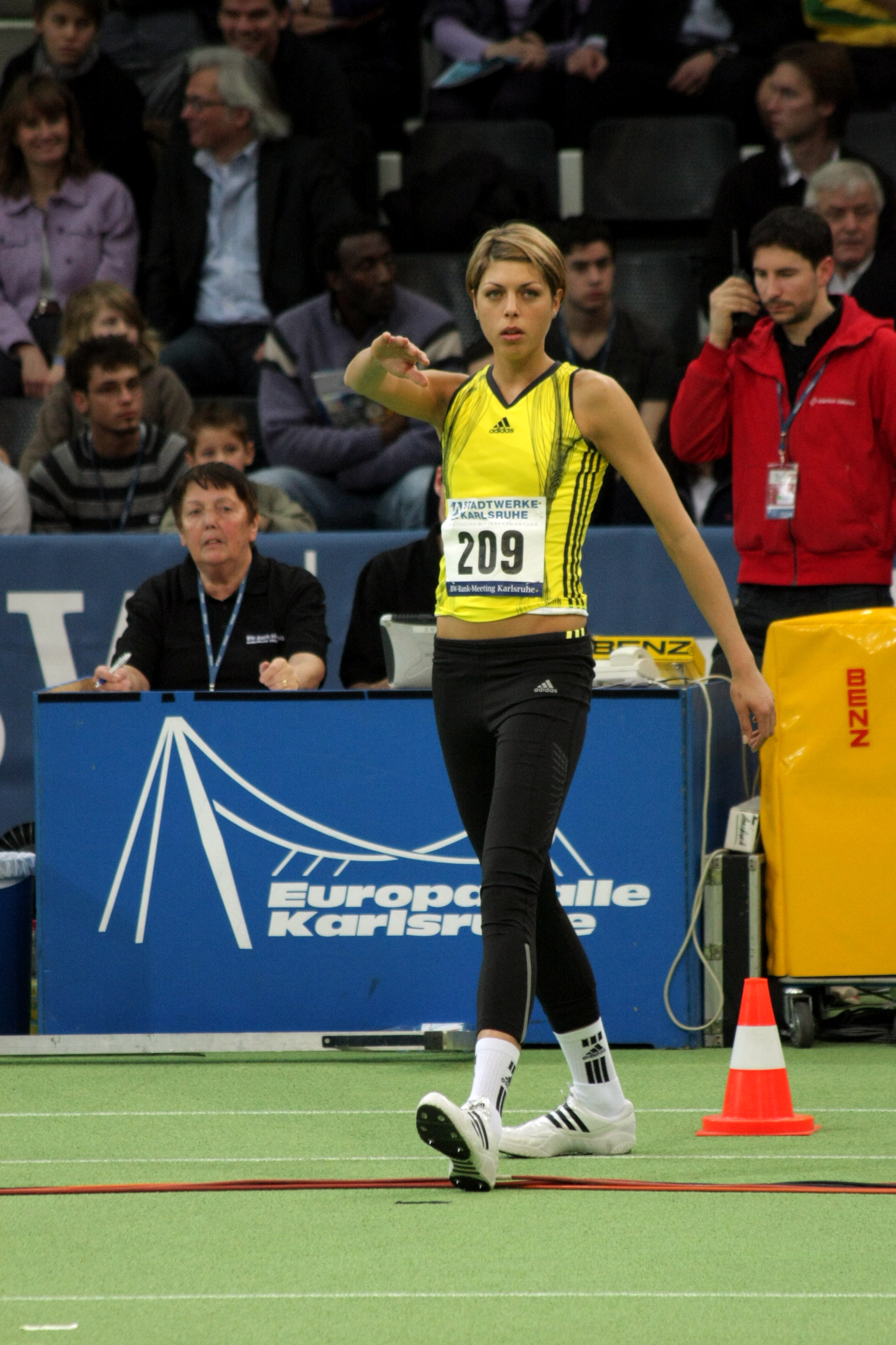 Blanka Vlašić